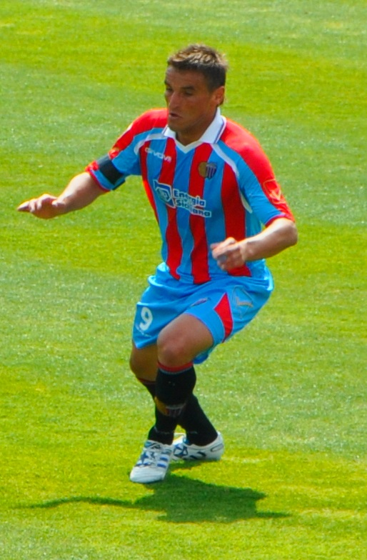 Gonzalo Bergessio 2011